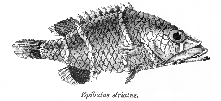 Epibulus striatus = Epibulus insidiator (Pallas, 1770)